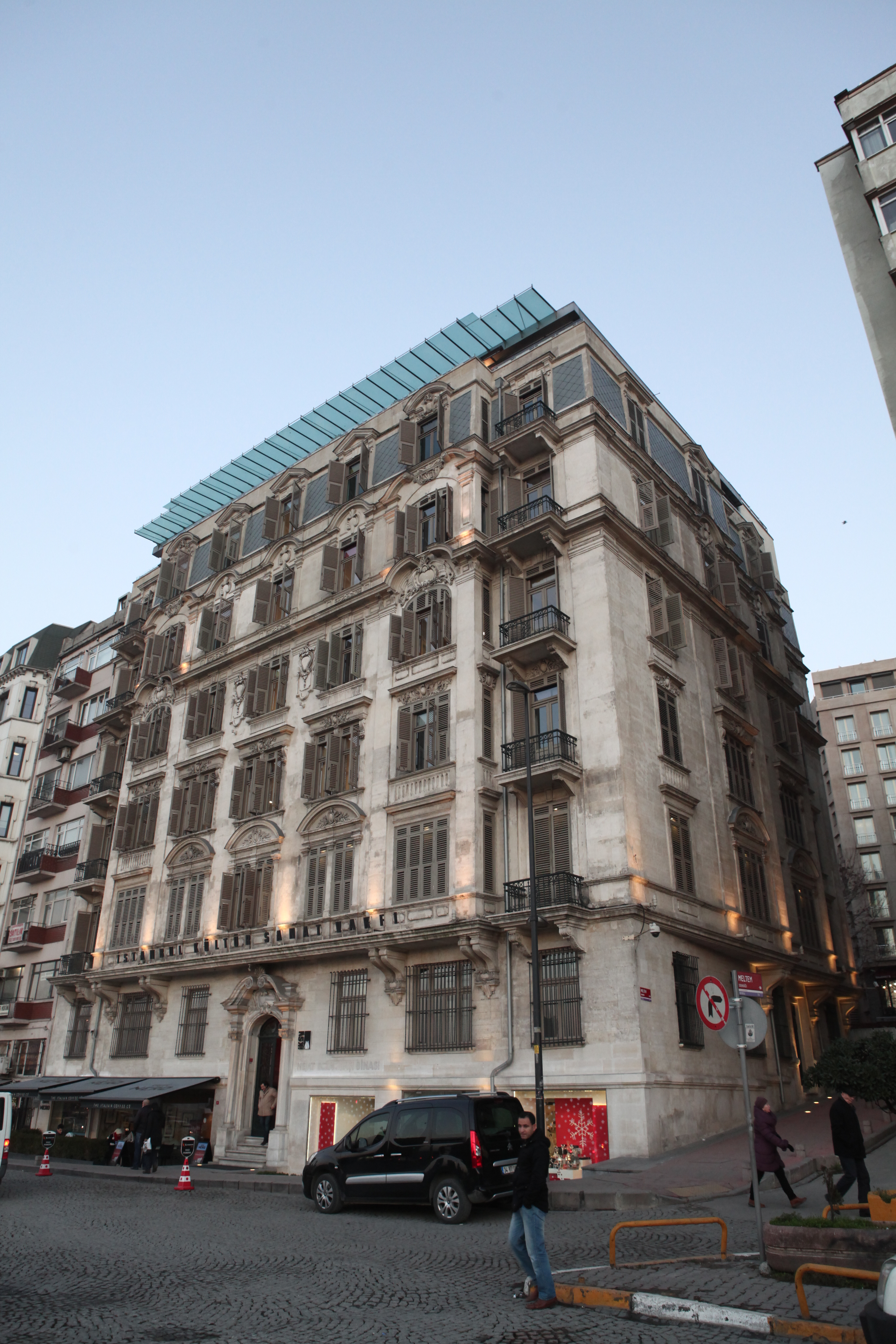 Fotoğraf: Ali Güler